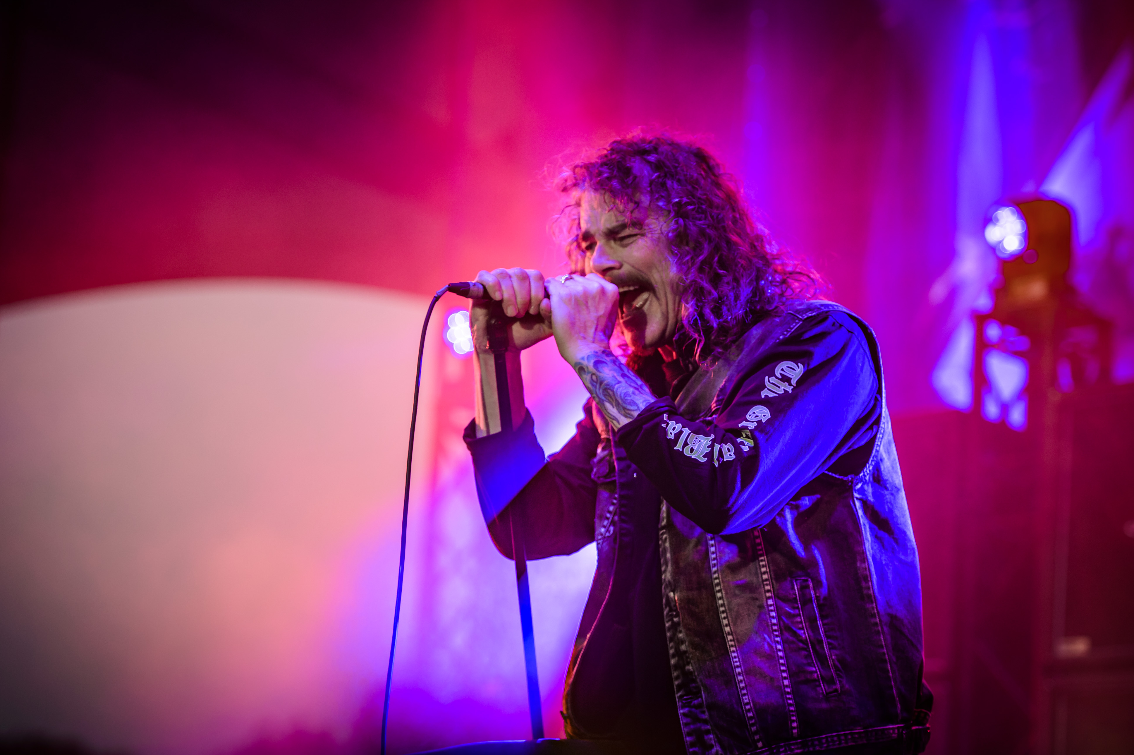 'Rock Hard Festival 2018; Amphitheater Gelsenkirchen': 'Overkill'